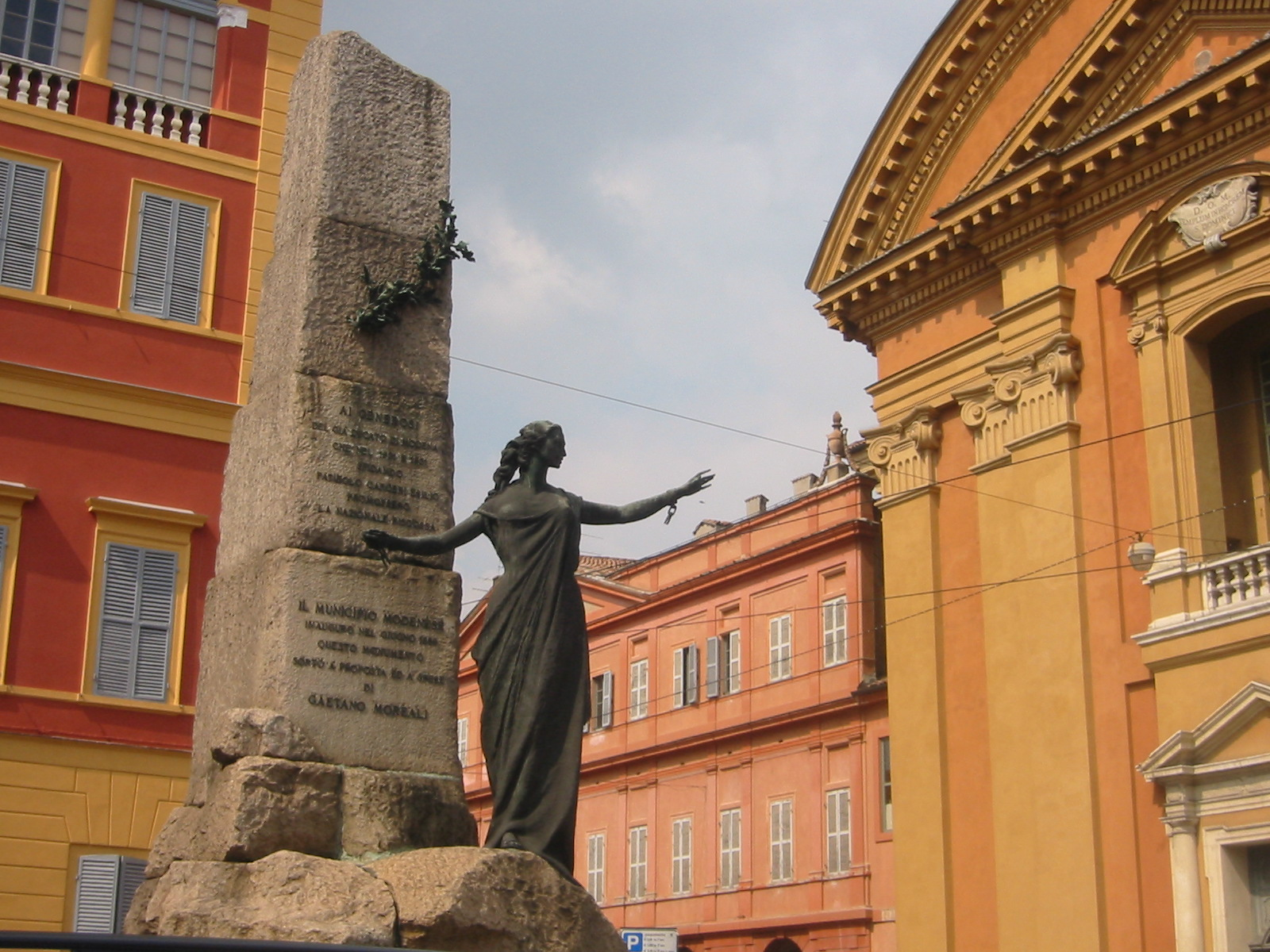 Modena